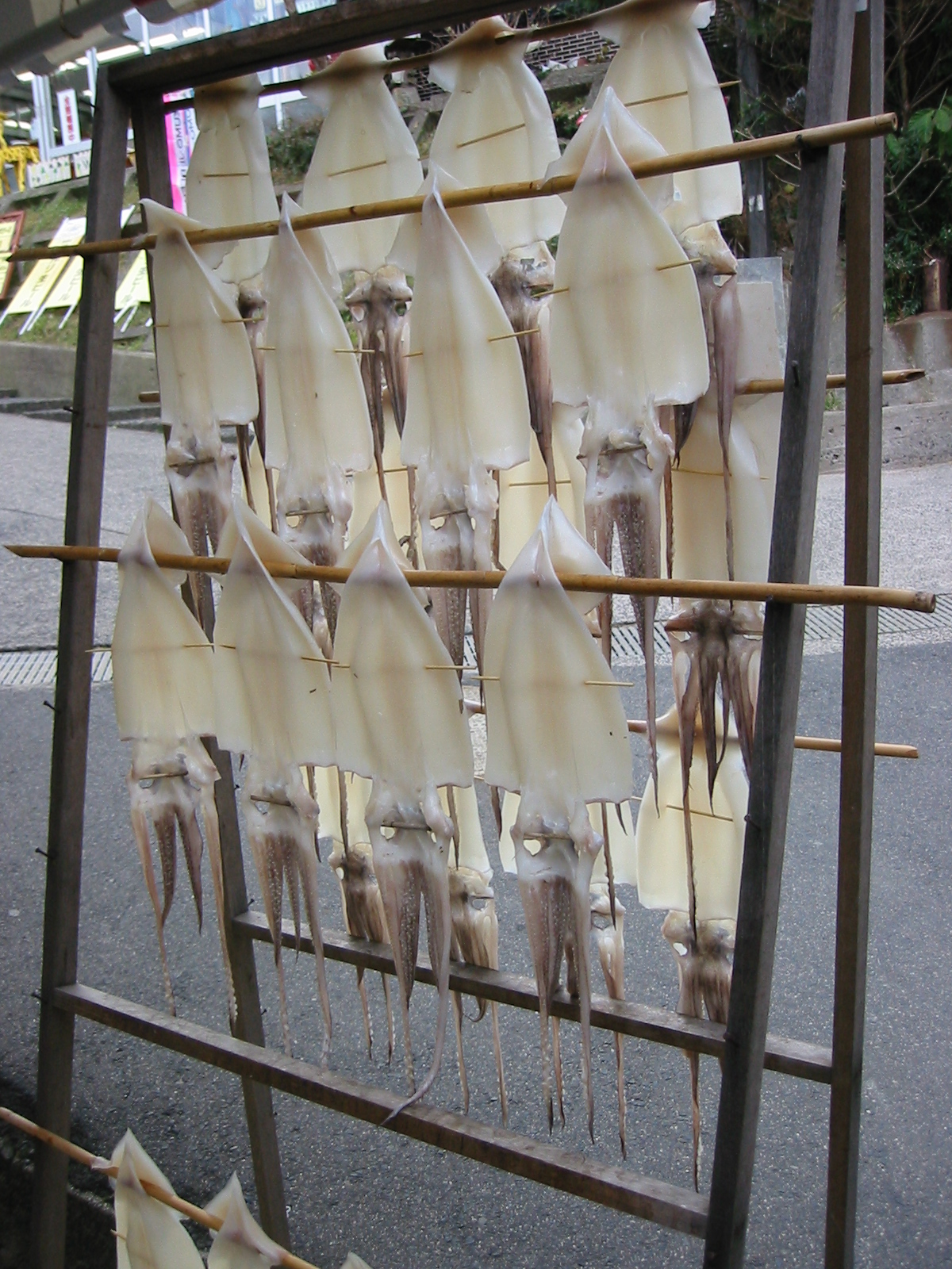 生干し するめ 日御碕にて